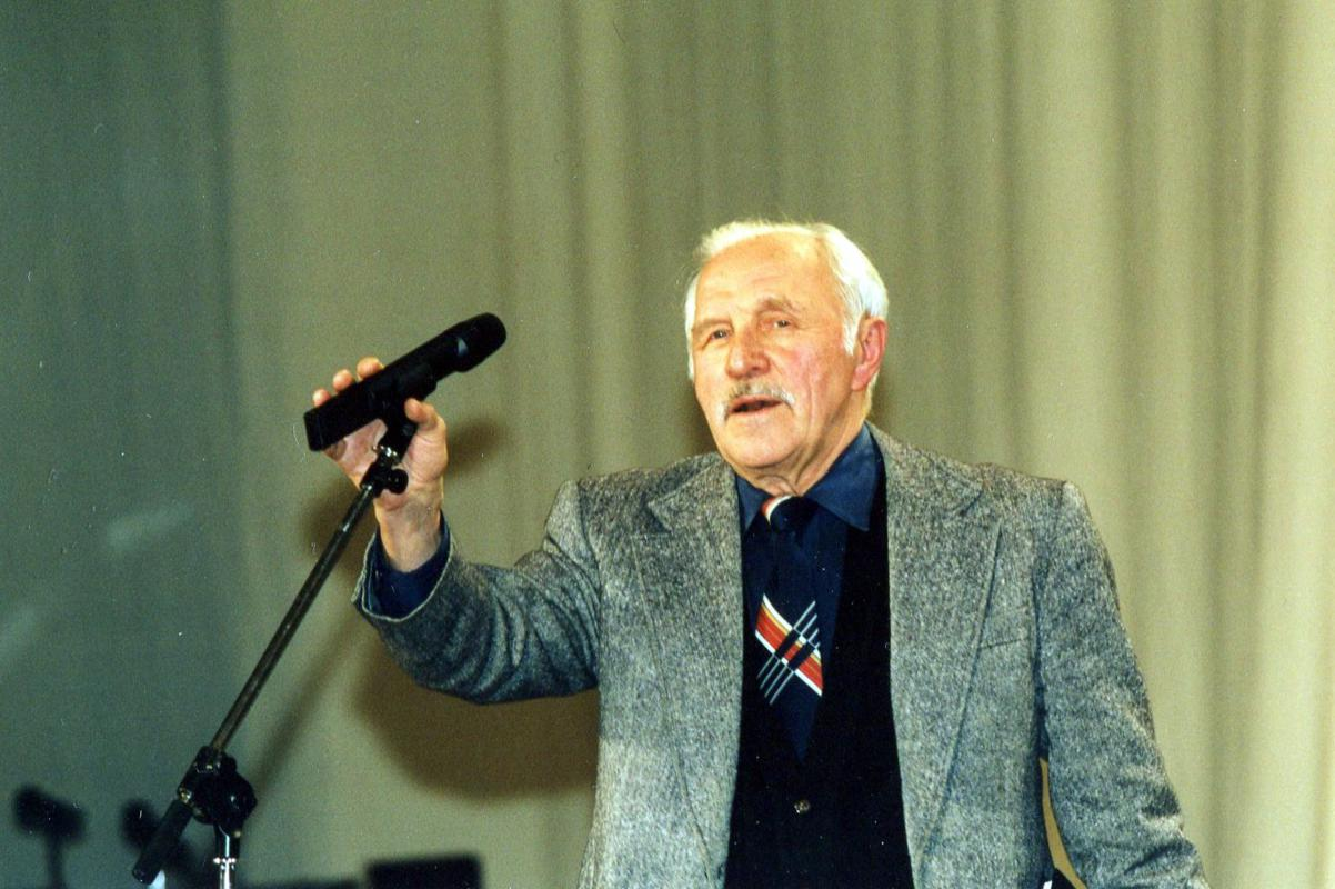 актёр Михаил Ульянов